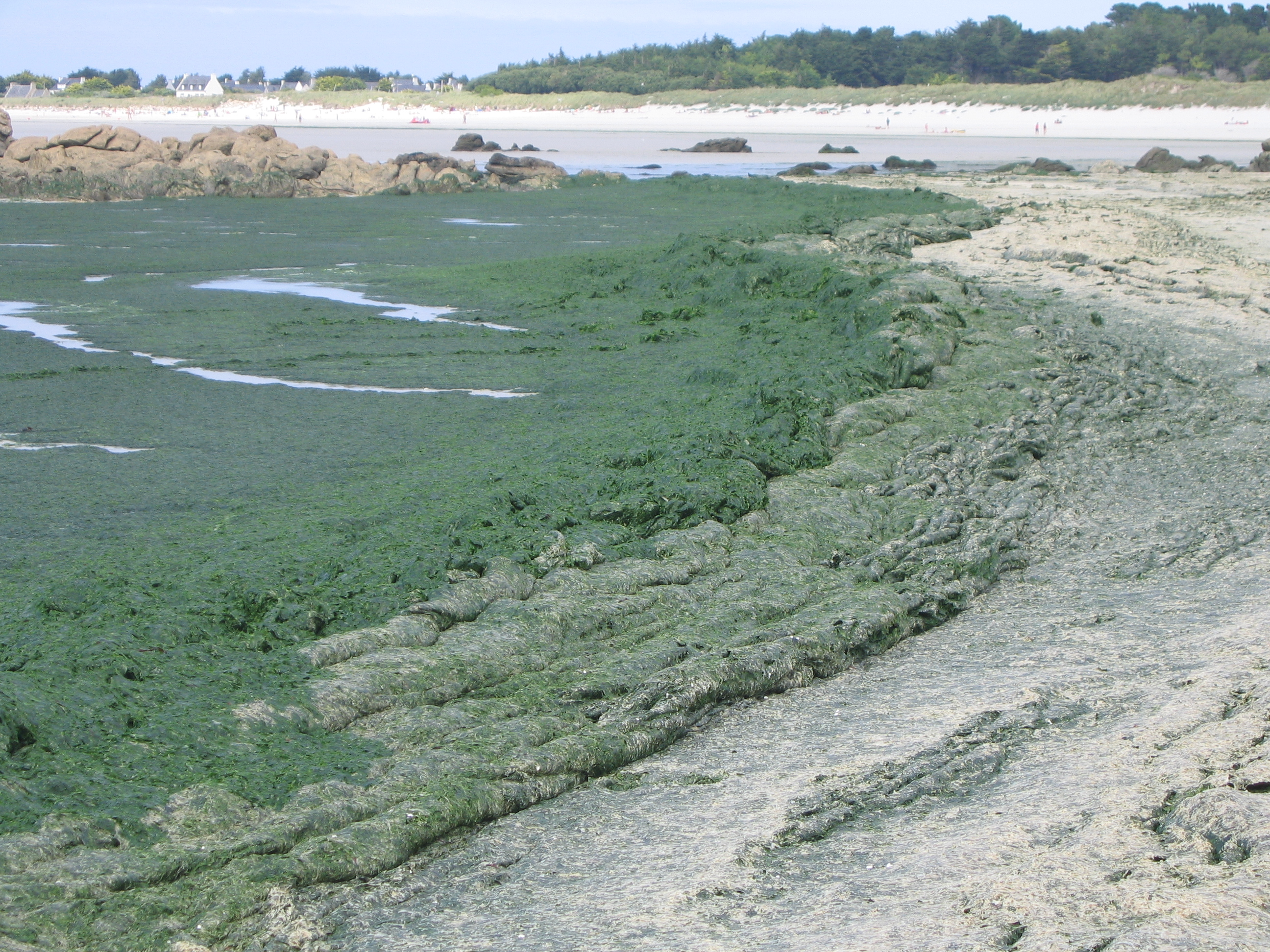 Des algues Ulva Armoricana lors d'une marée verte dans le nord Finistère